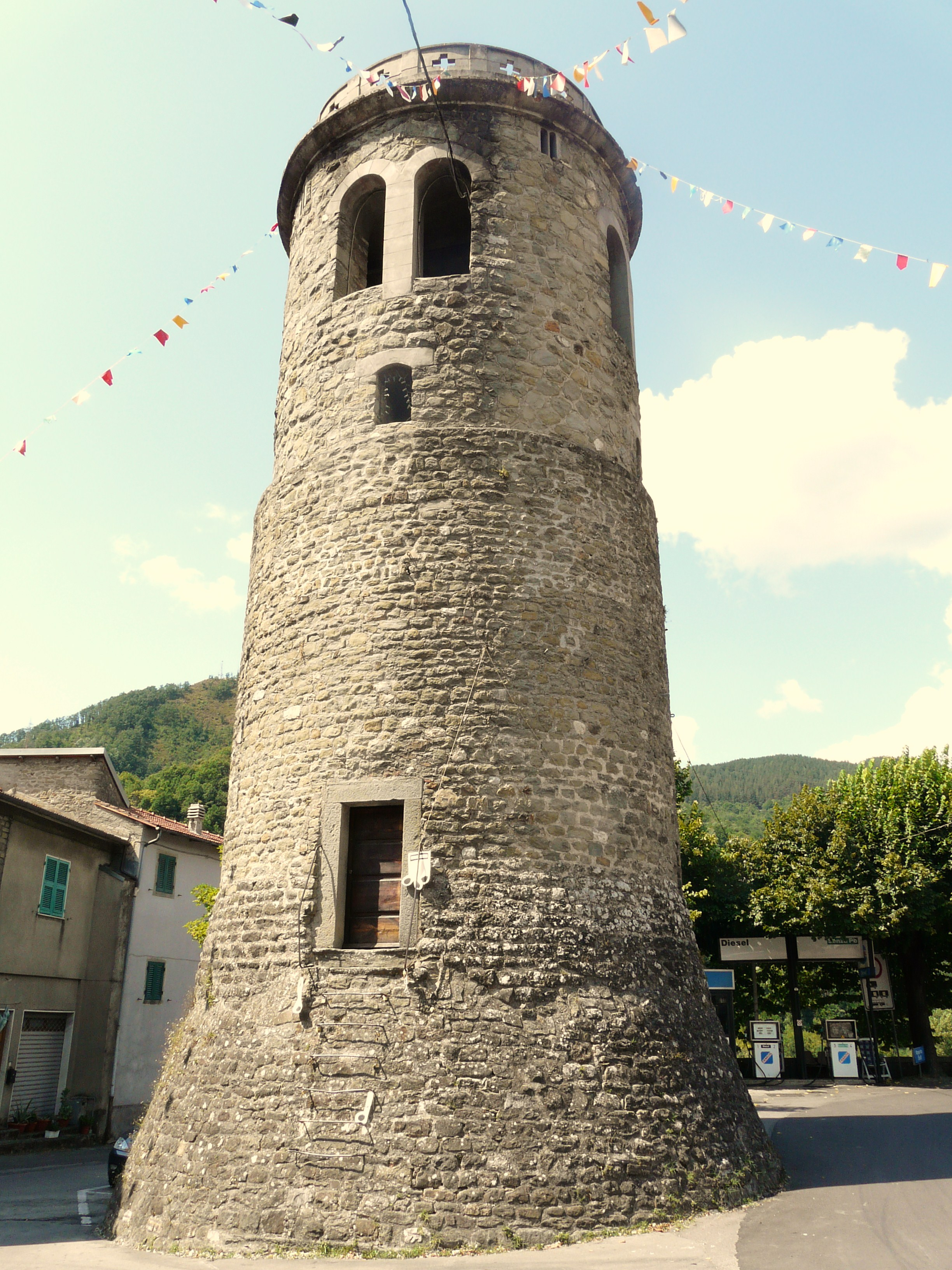 Torre di Casola in Lunigiana, Toscana, Italia